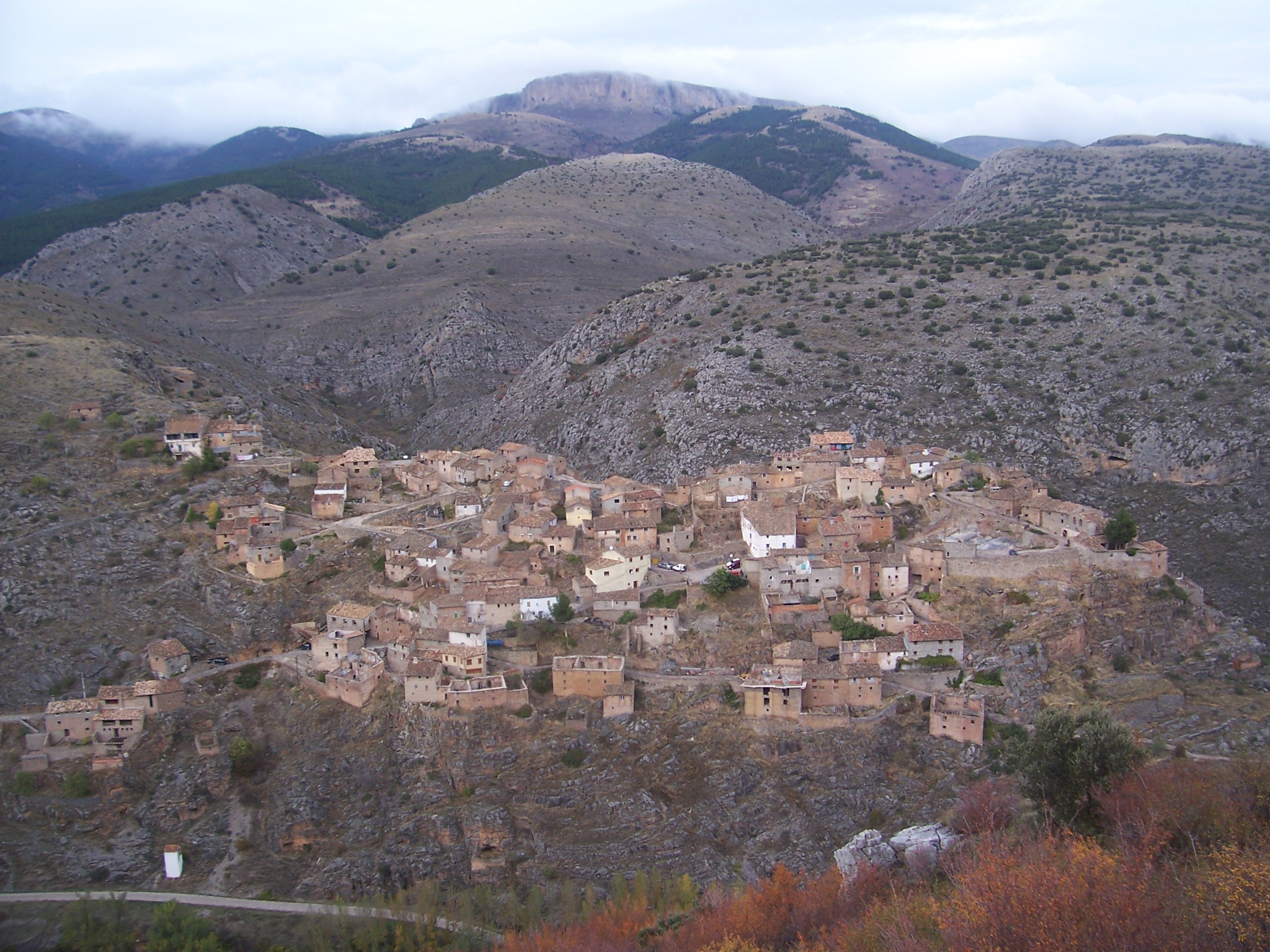 Fotografía de la localidad de Purujosa desde el Cabezo